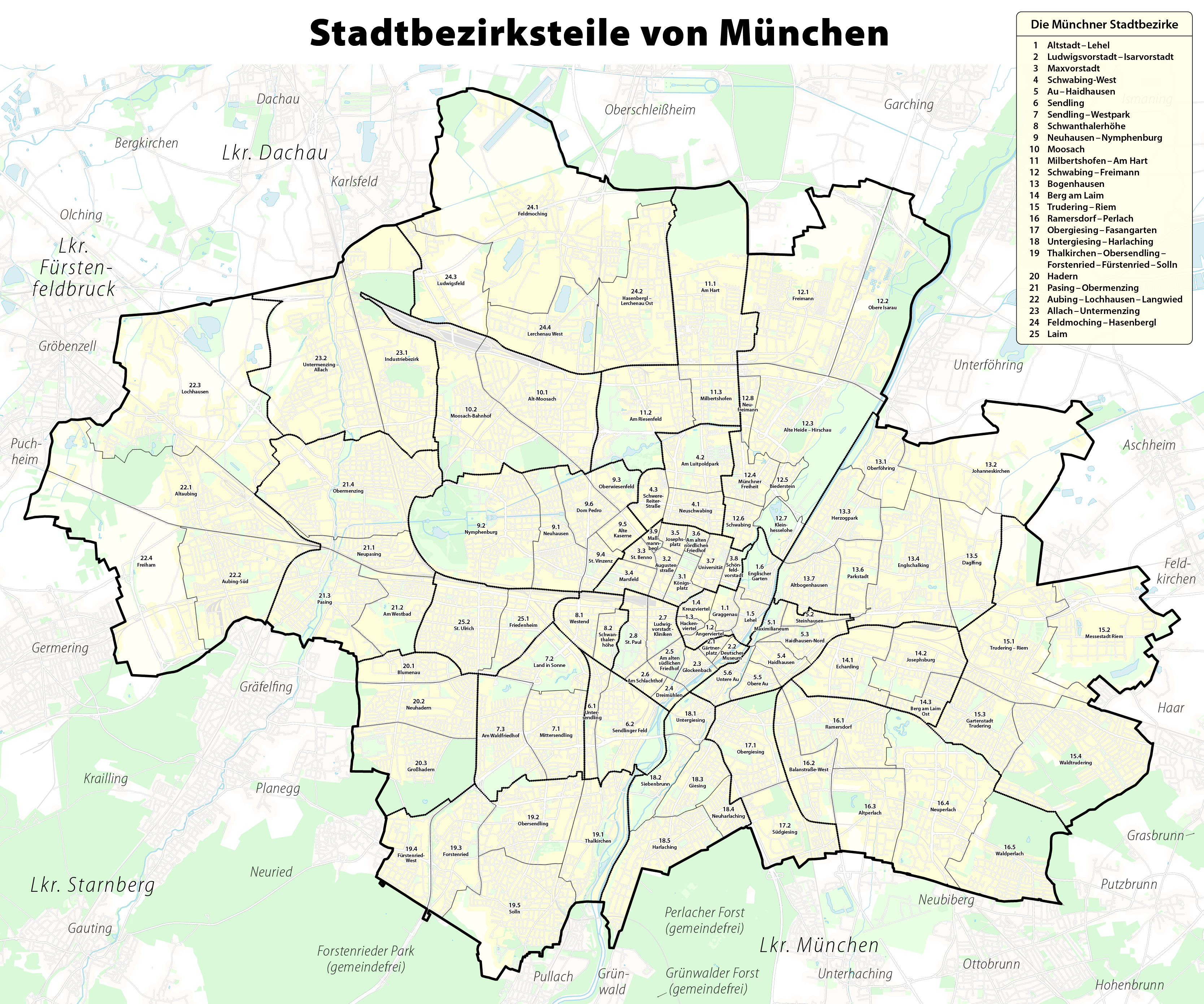 Karte der Stadtbezirksteile in MünchenHinweis: Die dargestellten Grenzlinien können nur einen ungefähren Eindruck von deren tatsächlicher räumlichen Lage vermitteln. Für genauere Informationen deshalb bitte unbedingt die entsprechenden amtlichen Nachschlagewerke zu Rate ziehen!